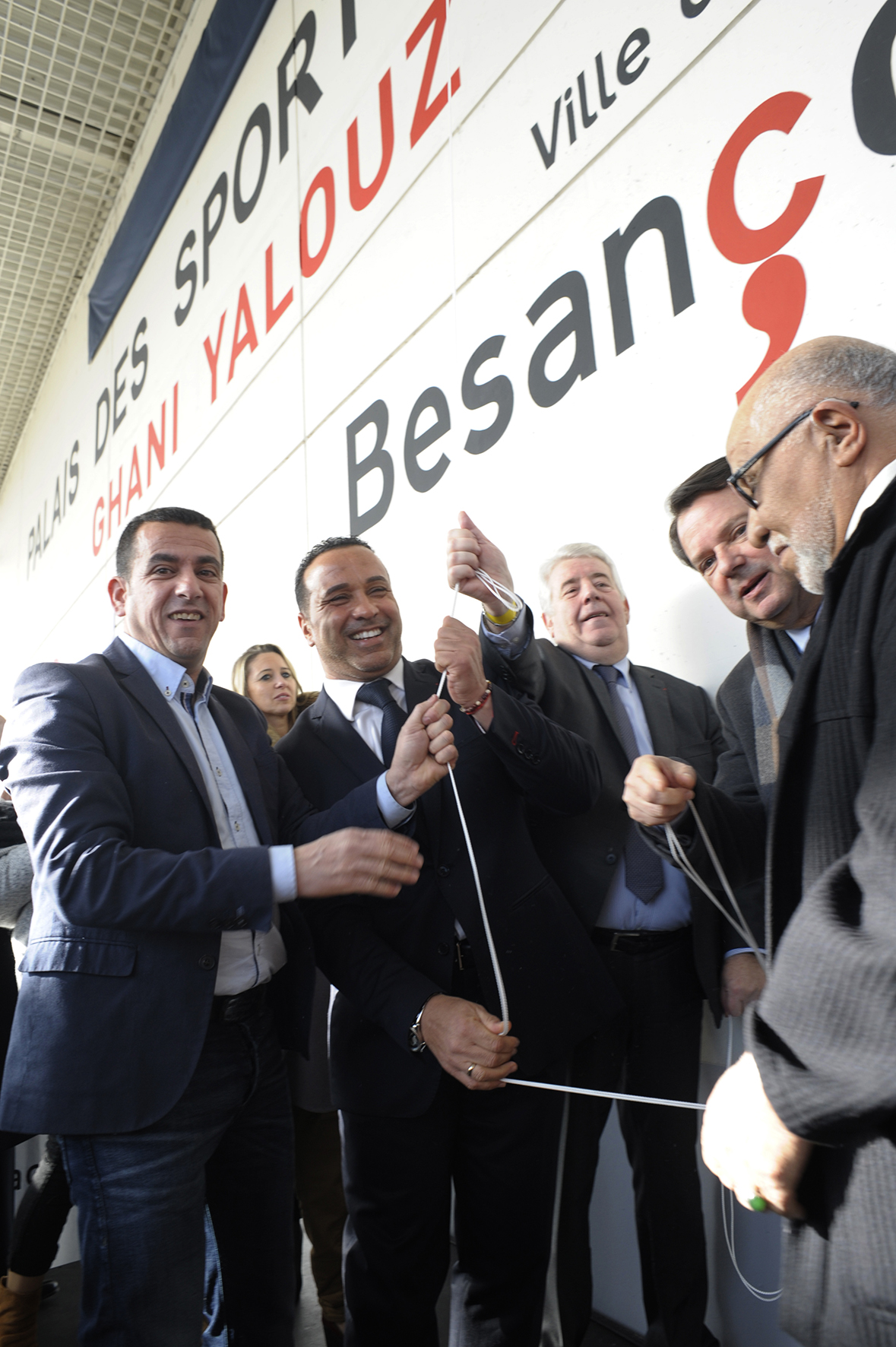 Dévoilement du nouveau nom du Palais des Sports de Besançon